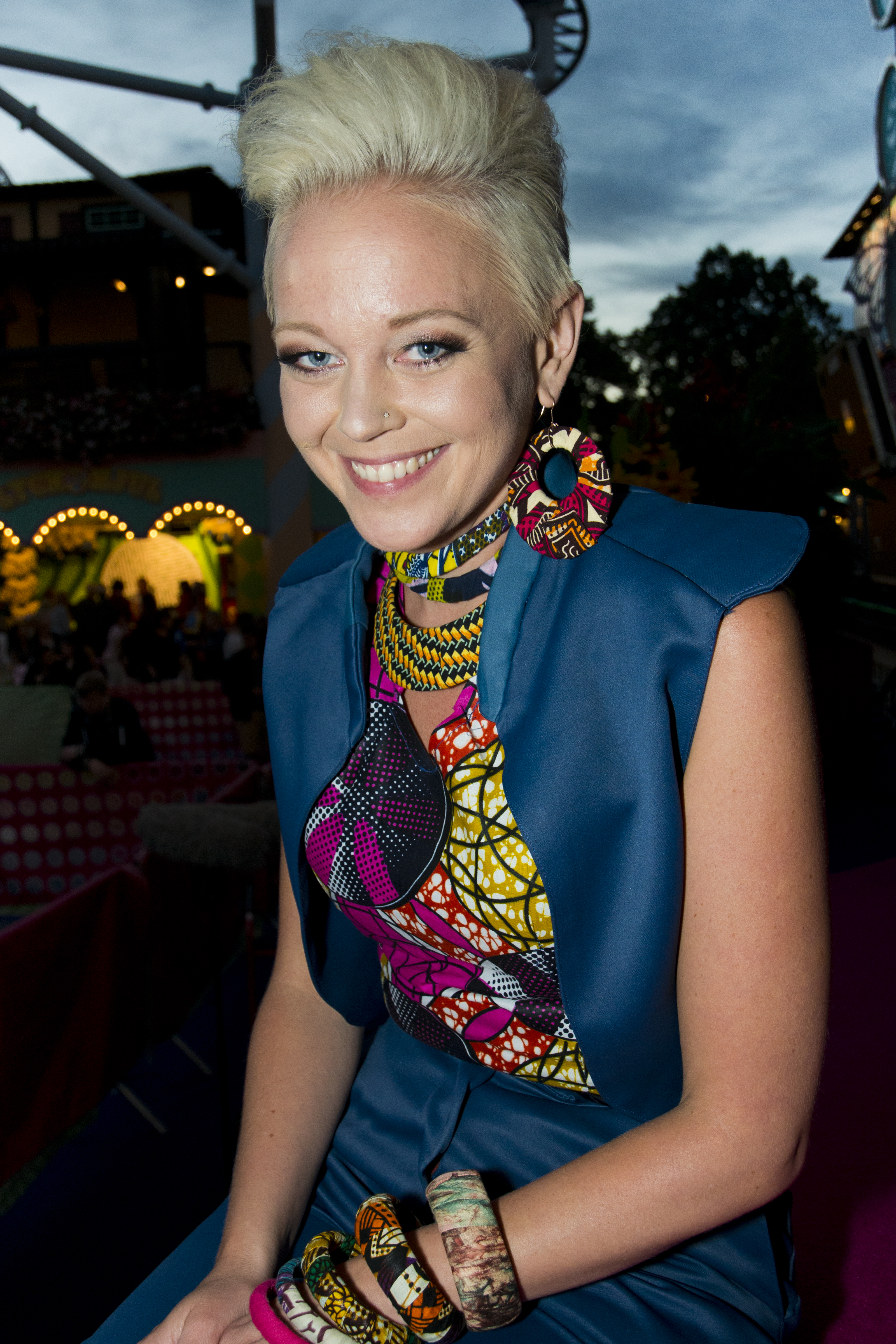 Saraha besöker Sommarkrysset, Gröna Lund, Stockholm.